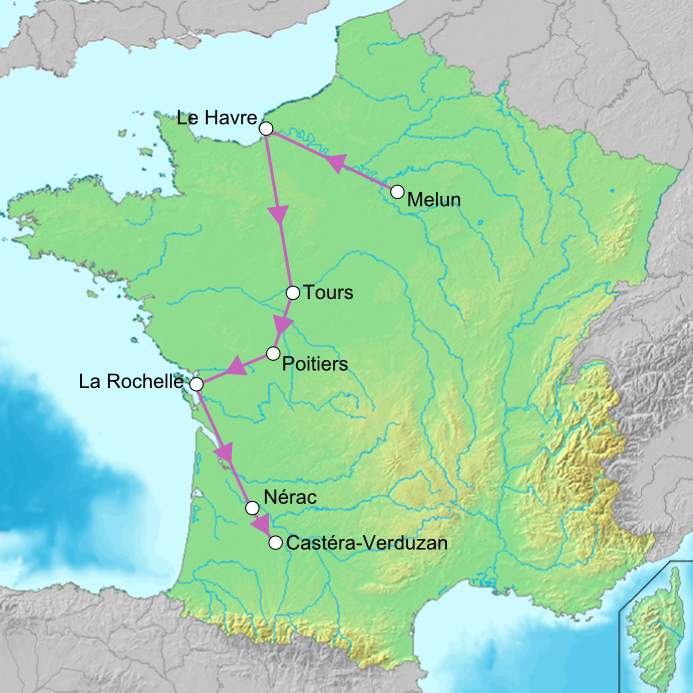 Pérégrinations de Vincent-Marie Viénot de Vaublanc sous la terreur à savoir départ de Melun pour le Havre puis de Le Havre vers Tours, Tours vers Poitiers, Poitiers vers La Rochelle, La Rochelle vers Nérac à coté de Bordeaux, et enfin de Nérac à Castéra-Verduzan dans le département du Gers.